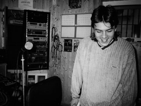 Migue grabando su ultimo proyecto, matajare.